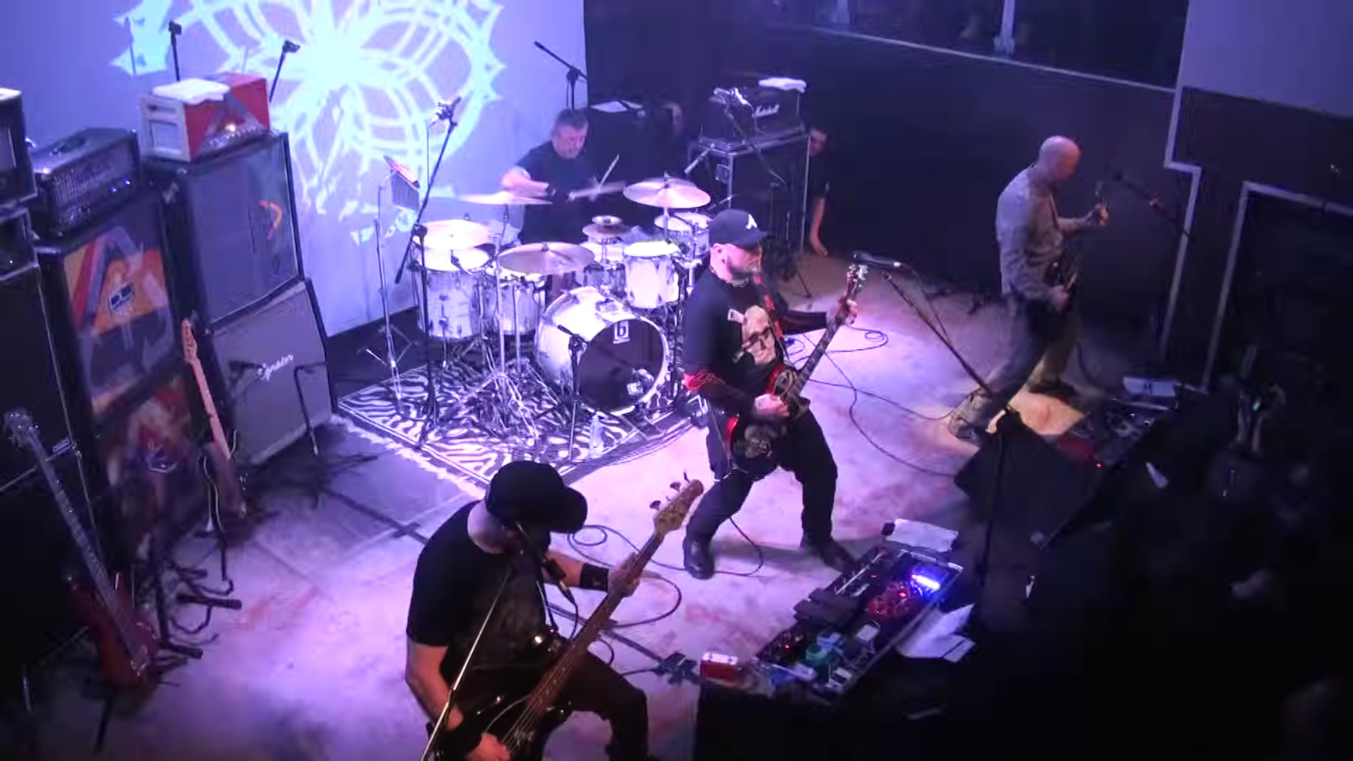 "Illusion", klub "Parlament" w Gdańsku, ul. Świętego Ducha 2.